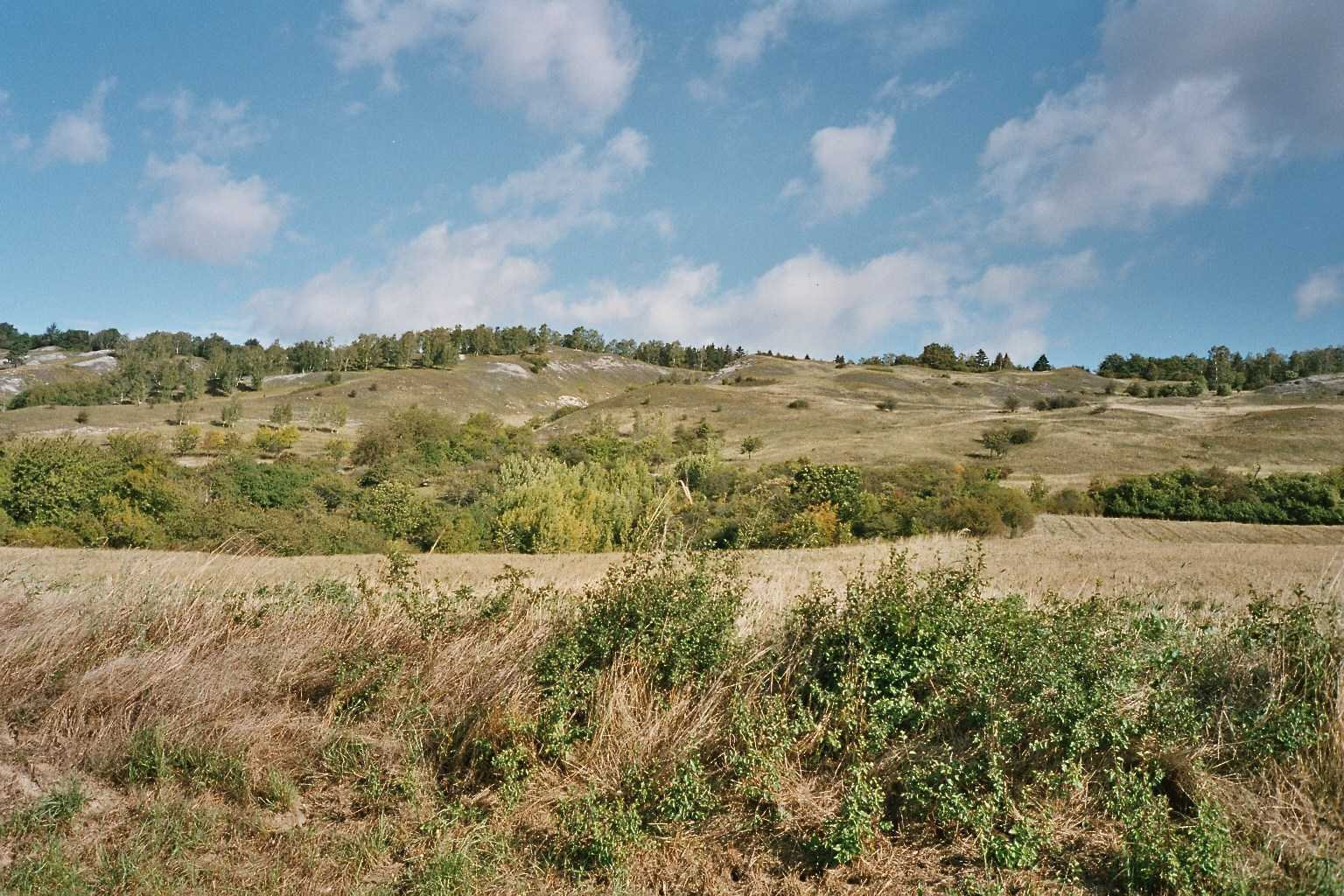 Die Gipskarstlandschaft des Kyffhäusers, eigenes Bild. GNU FDL